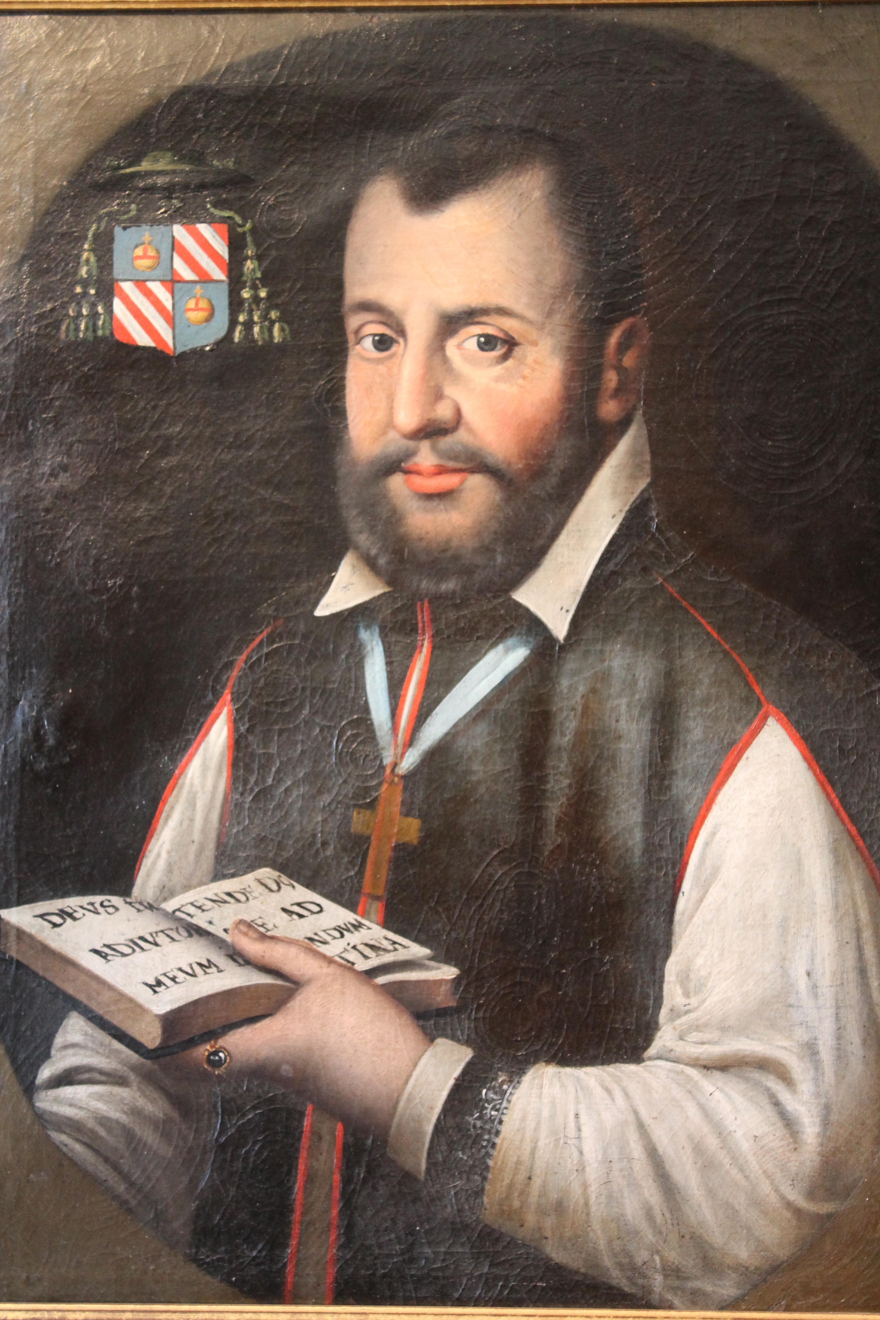 Portrait de Gallois de Regard, dans le château de Clermont (Haute-Savoie).